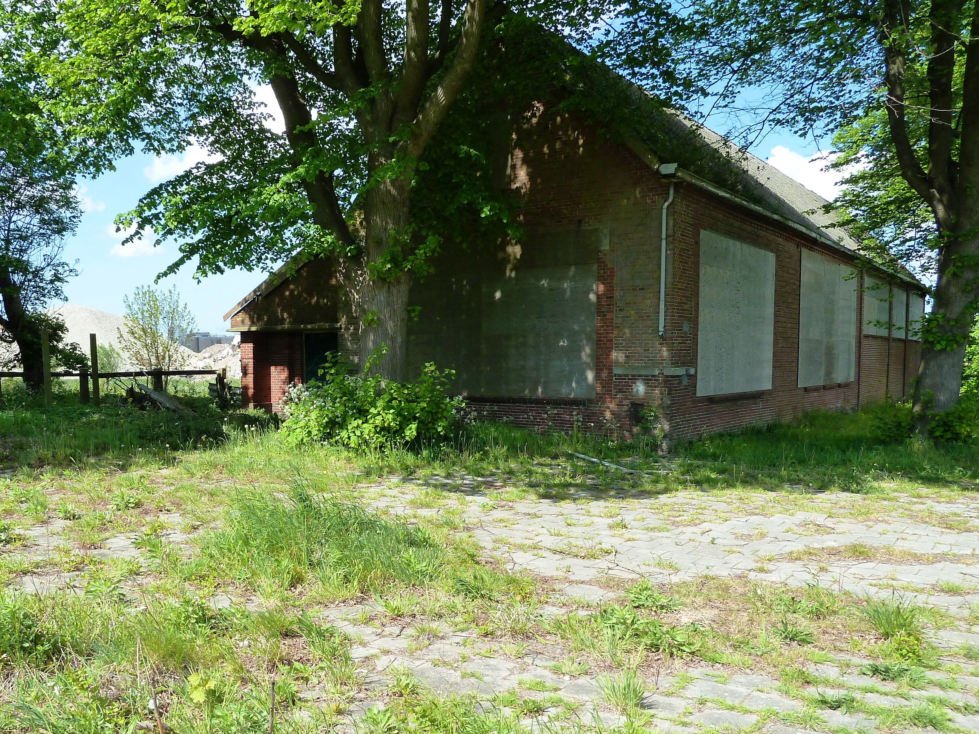 Leegstaande school in Weiwerd